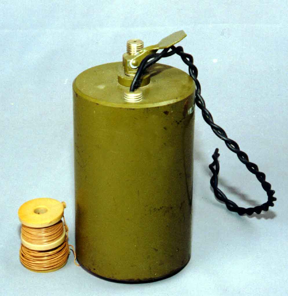 Sowiecka mina przeciwpiechotna OZM-3